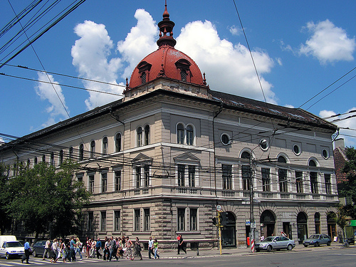 Institutul Teologic Protestant Cluj-Napoca, piața Avram Iancu nr. 13